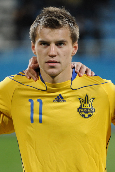 Андрей Ярмоленко, украинский футболист, форвард киевского «Динамо»